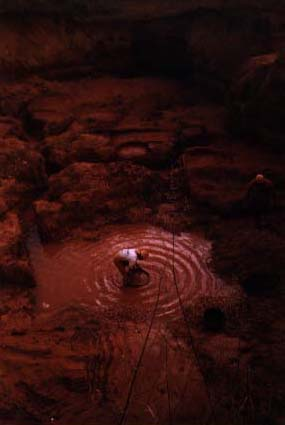 Chercheur de diamant au Brésil (Mato Grosso)